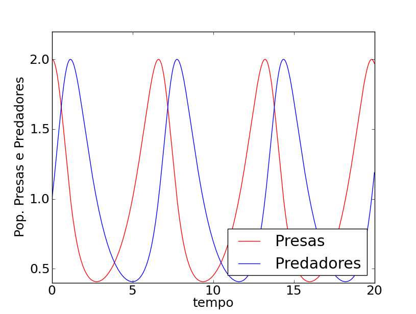 Essa imagem mostra a variação no tempo para uma população de presas e predadores obtidas utilizando o modelo de Lotka-Volterra.